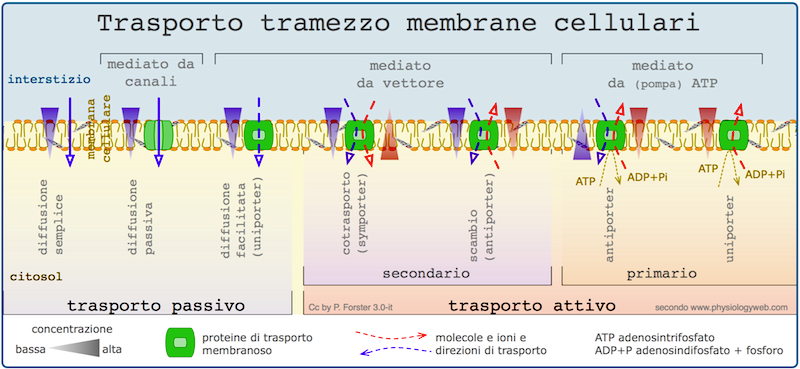 Membrana cellulare, canali proteici, canali ionici, uniporter, symporter, antiporter, pompa ATP, conformazione